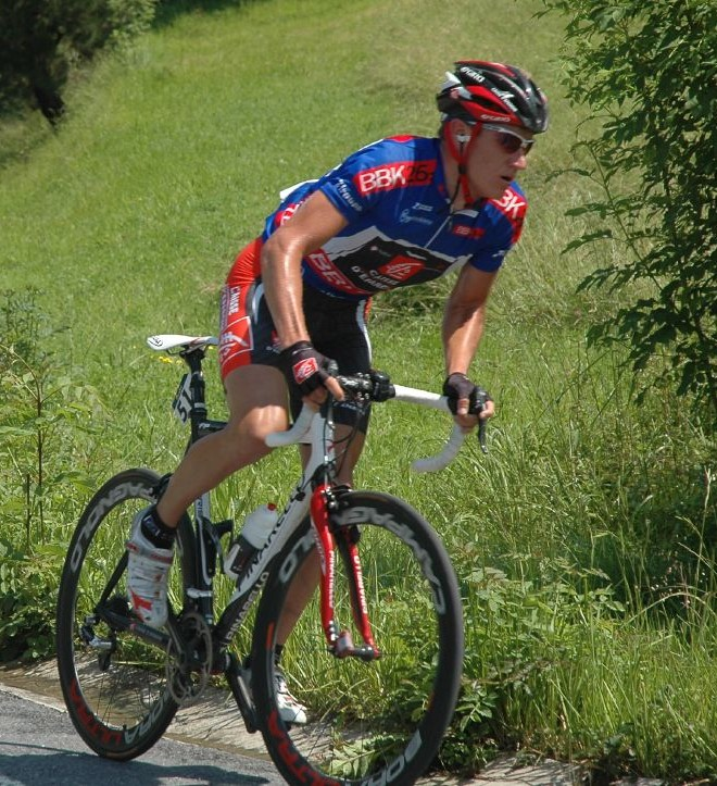 Vladimir Efimkin, Euskal Bizikleta 2007.